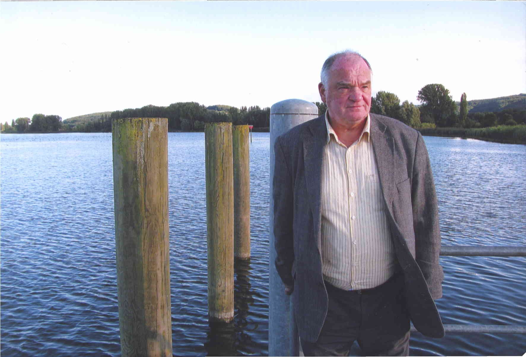 Gerald Wiemers in Masuren